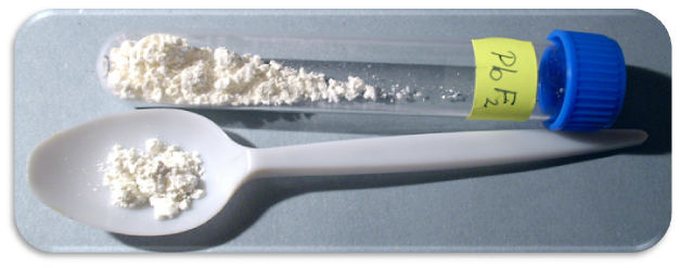 PbF2